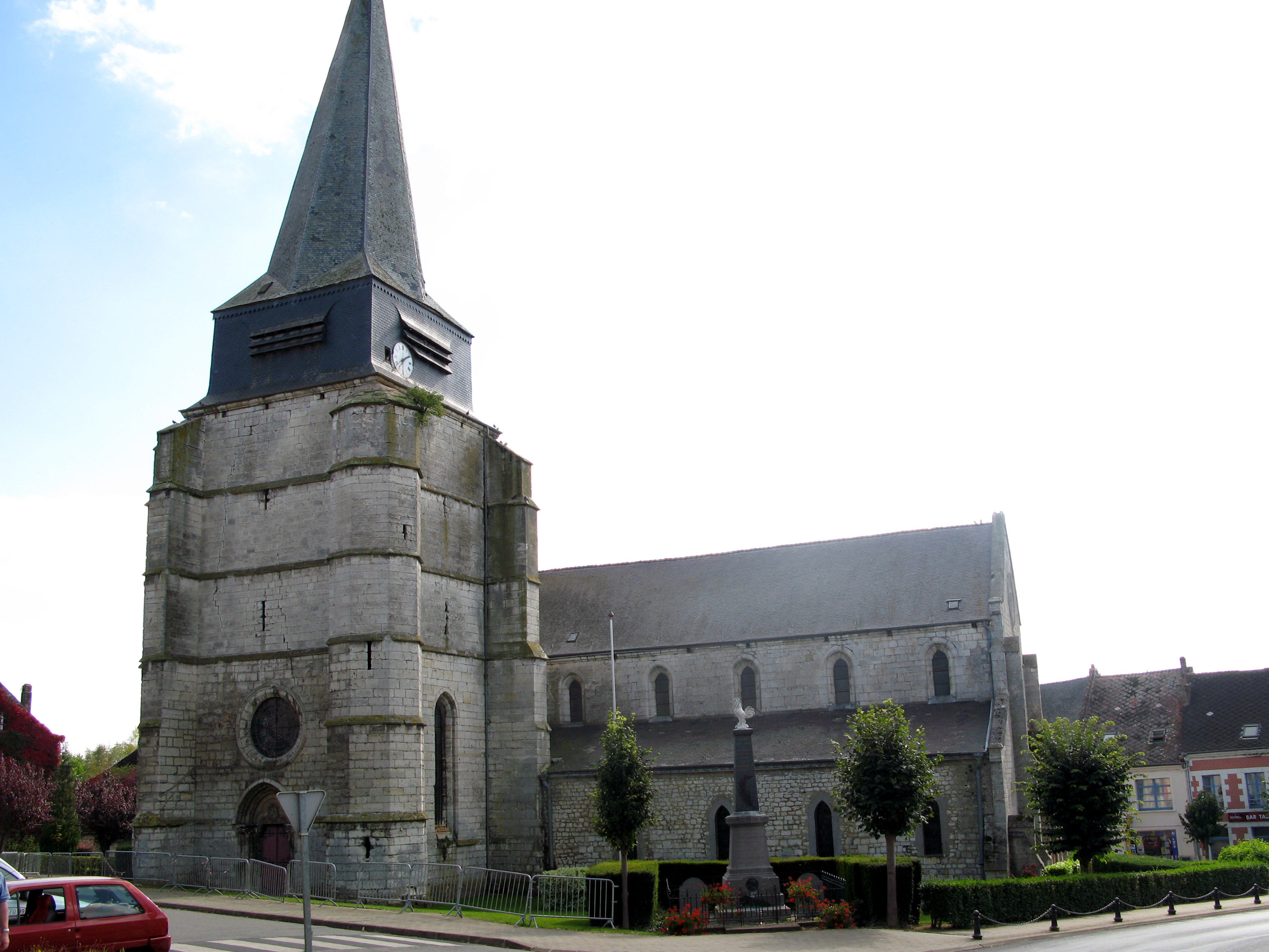 Aubenton (Aisne, France) - L'église et le monument-aux-morts. Lors des "Journées européennes du patrimoine 2007", des barrières métalliques interdisaient l'accès à l'église. On remarque en effet 2 longues fissures verticales entre la rosace et la chambre des cloches. Par ailleurs, un arbuste semble prospérer au sommet de la tour d'escalier.